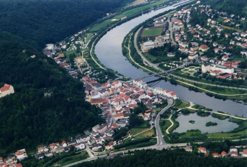 Luftaufnahme aus 300mtr Höhe